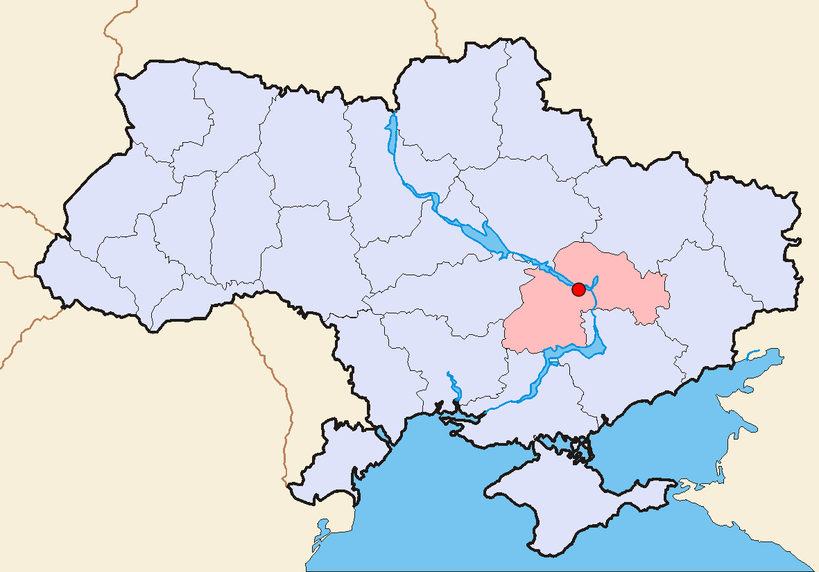 based on Image:Kryvyi Rih Ukraine map.png from user User:Skluesener.